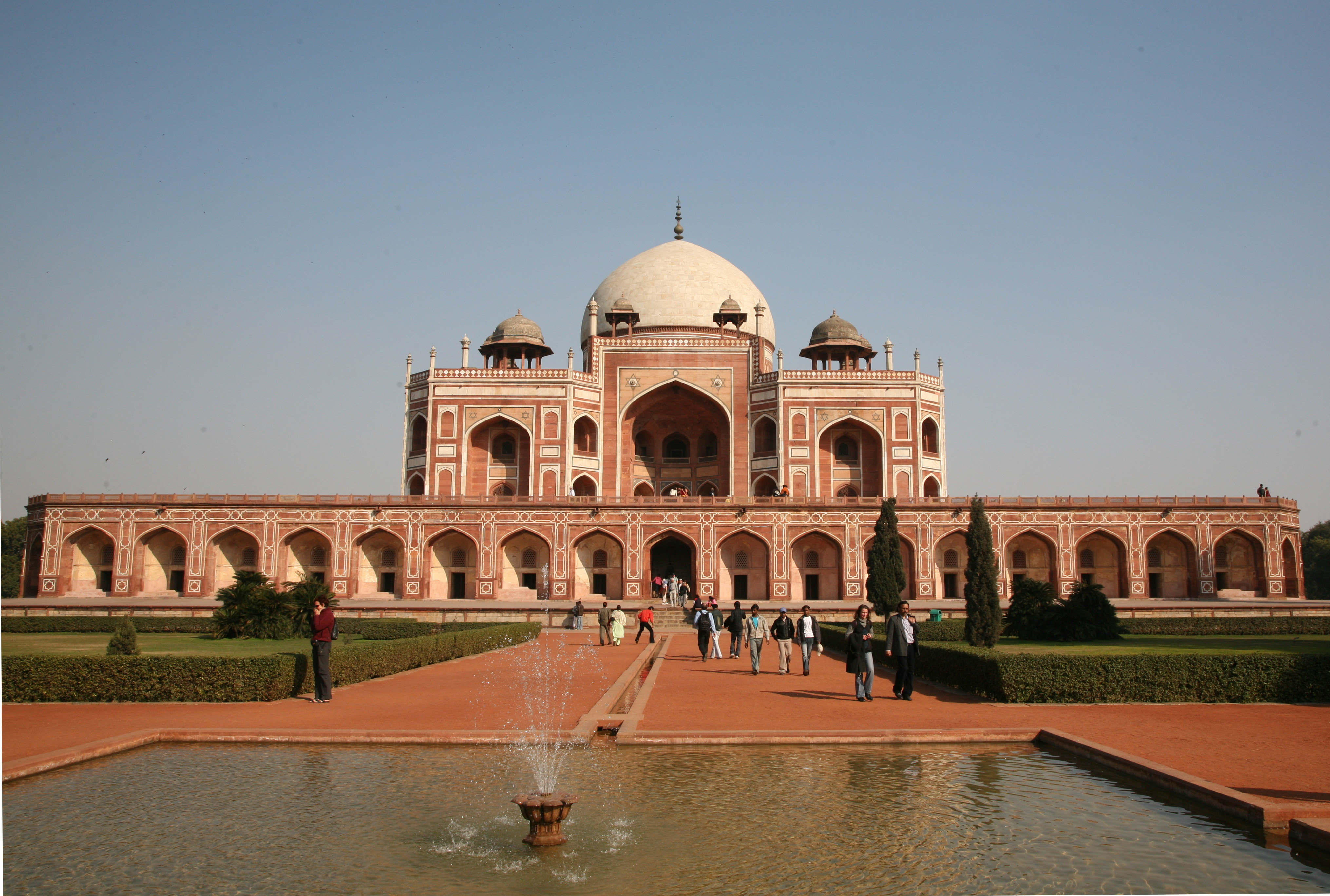 Humayun's Tomb, Delhi.